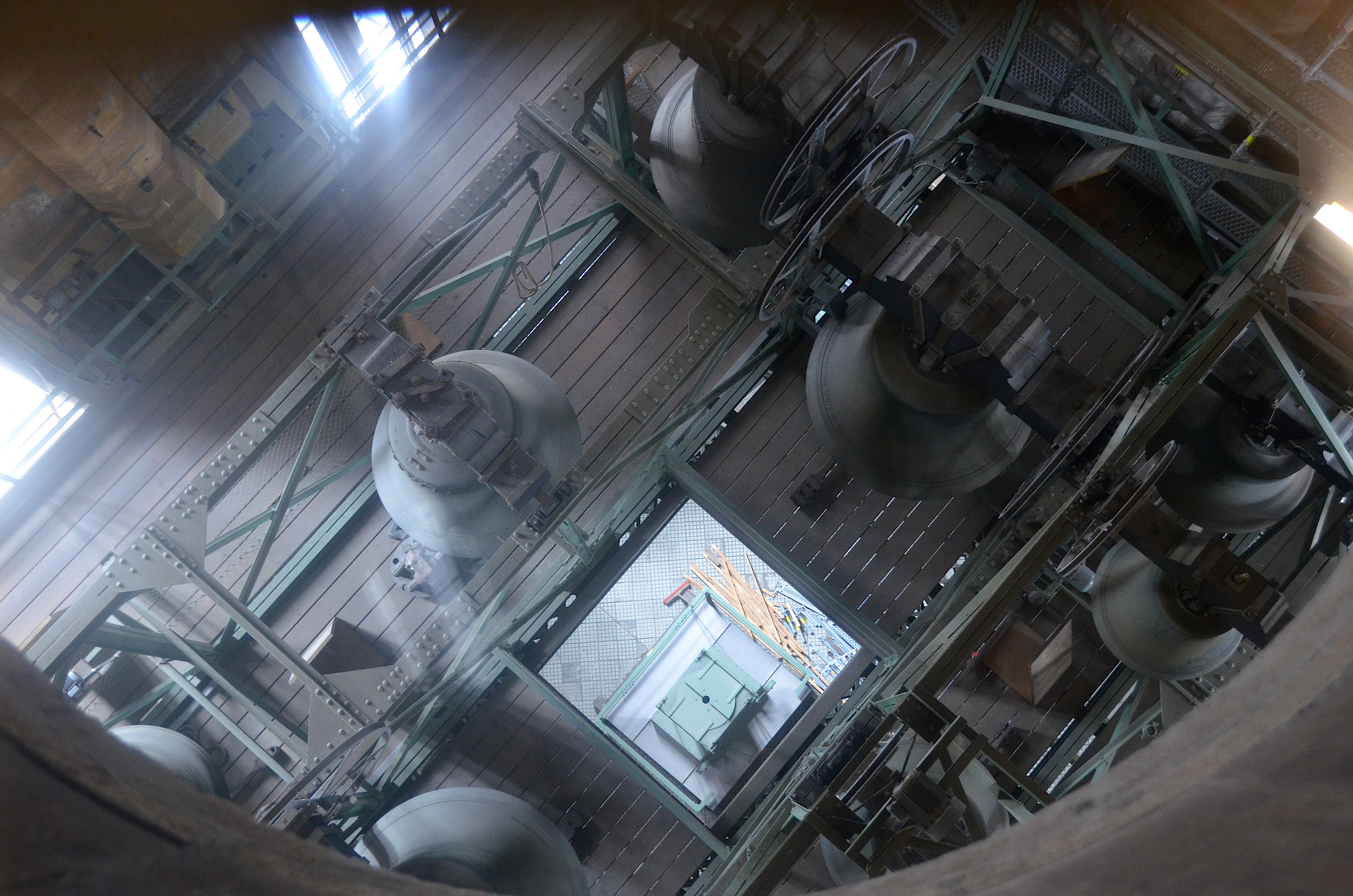 Kirchenglocken des Ulmer Münsters (2019)